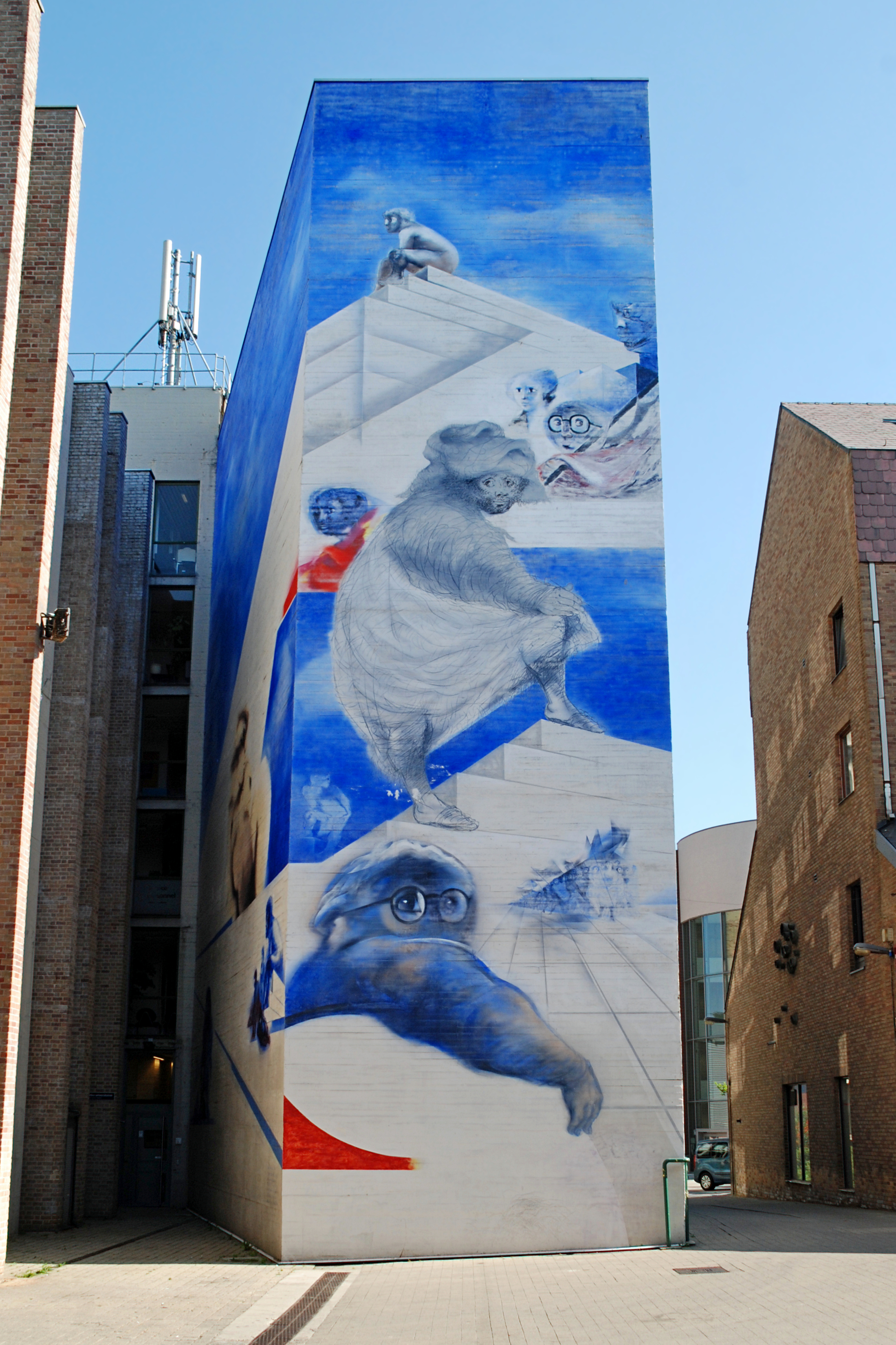 Belgique - Louvain-la-Neuve - rue des Wallons - Fresque "Qu'est-ce qu'un intellectuel ?" - Collectif d'art public 1987 (projet Roger Somville) This photo of immovable heritage has been taken in the Walloon Region